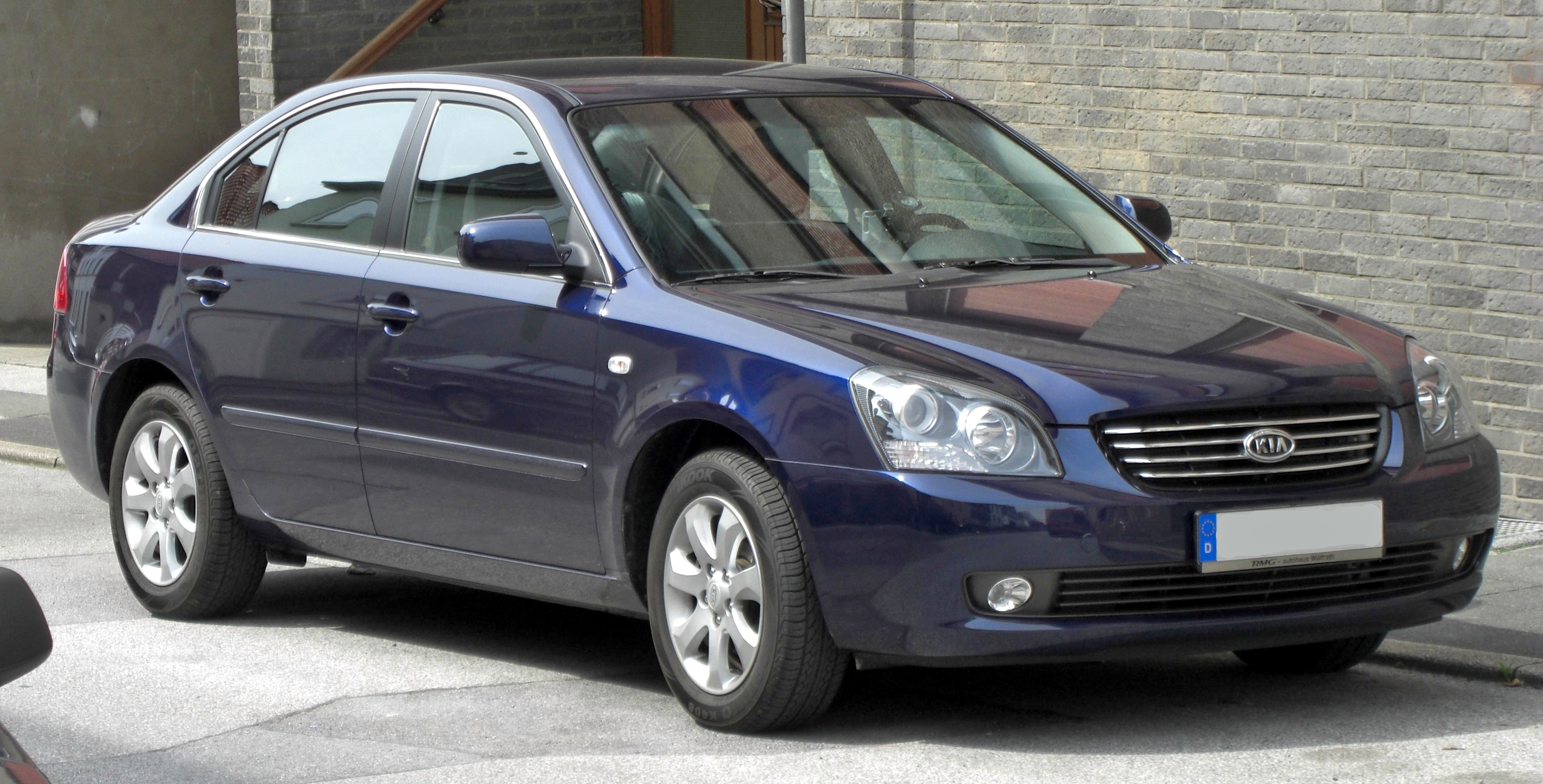 Kia Magentis